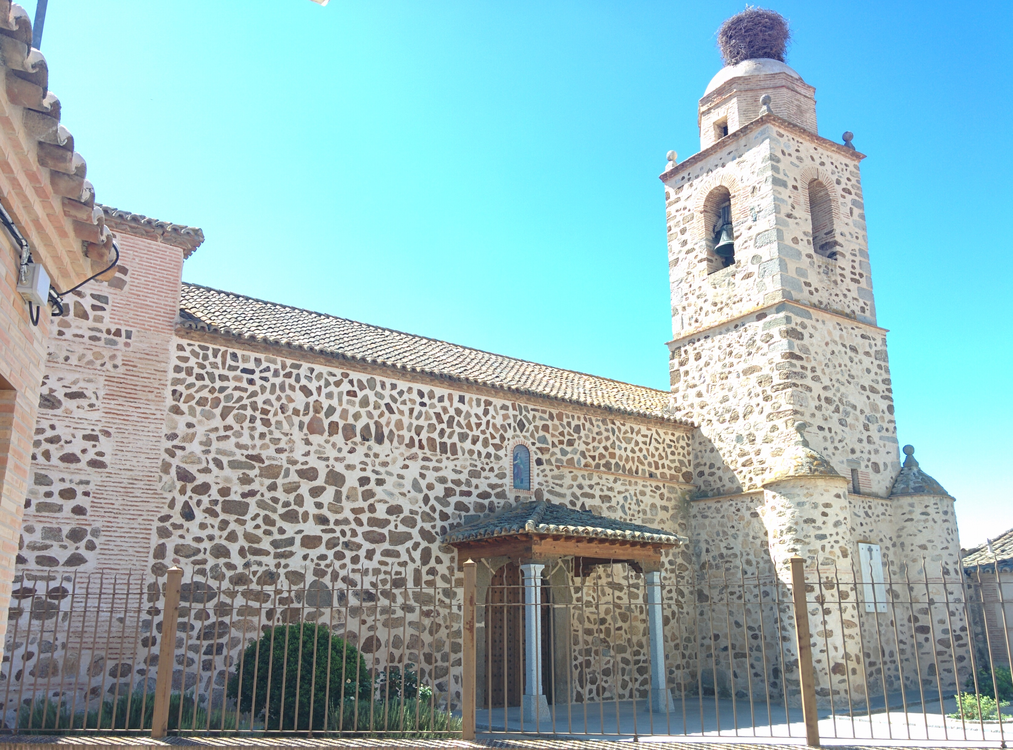 Iglesia de Santa Leocadia, en Casasbuenas (Toledo, España).